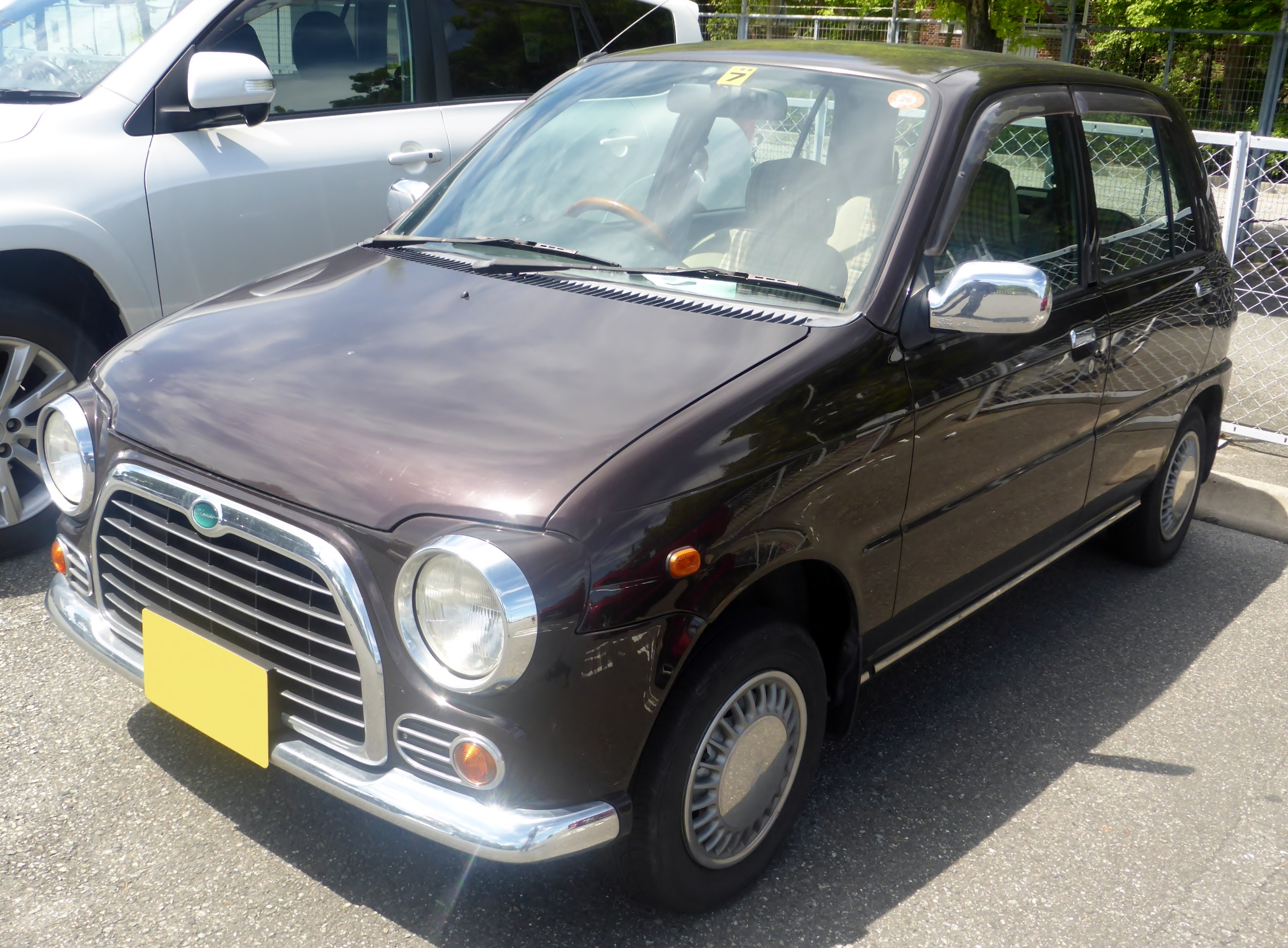 L500S型ダイハツ・ミラクラシックをフロントから撮影。